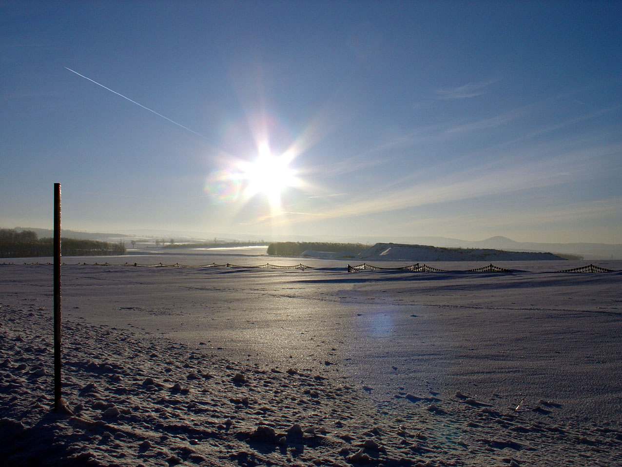 Liebenauer (Sachsen,Erzgebirge) Winterlandschaft